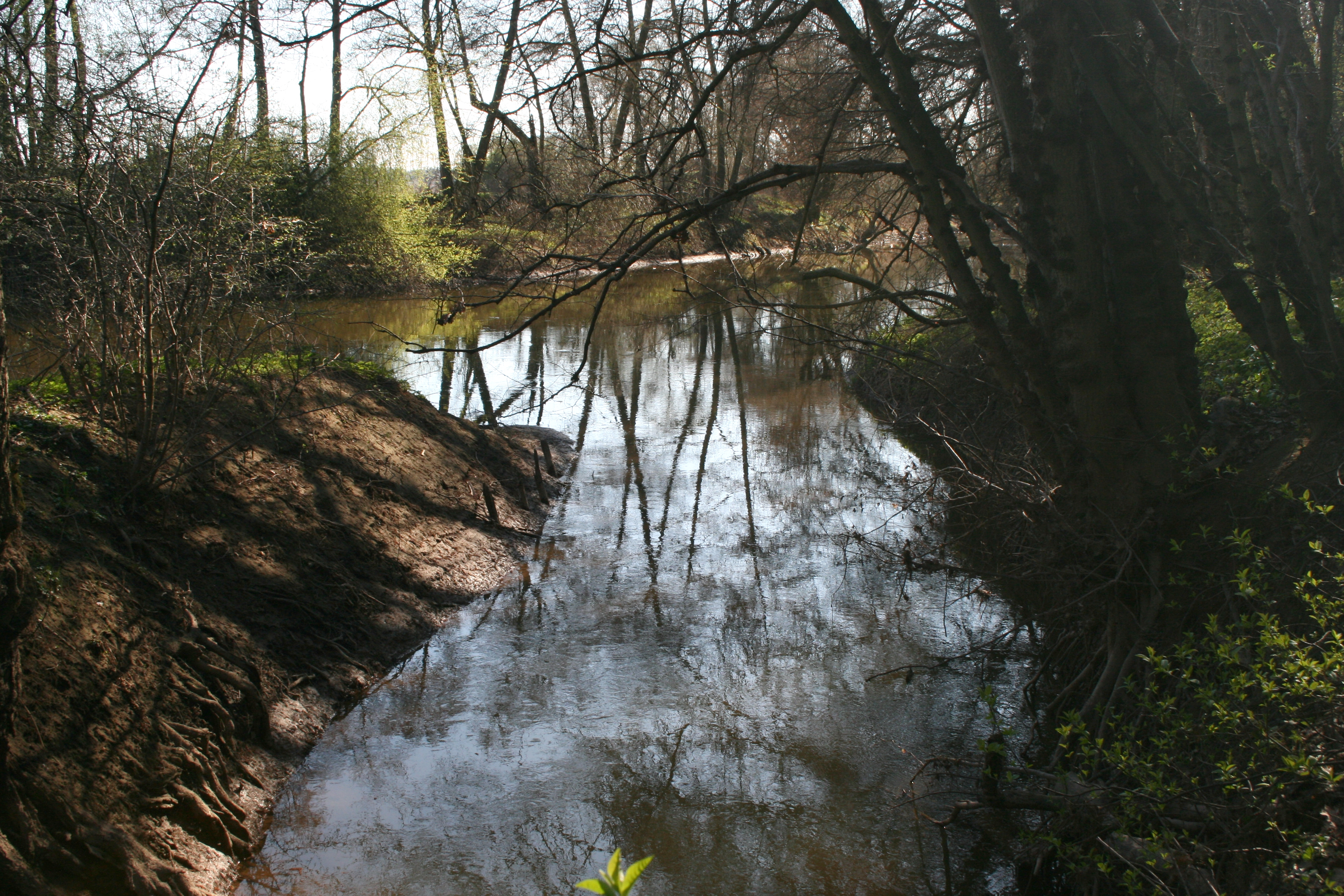 Mündung der Gründau in die Kinzig bei Langenselbold.